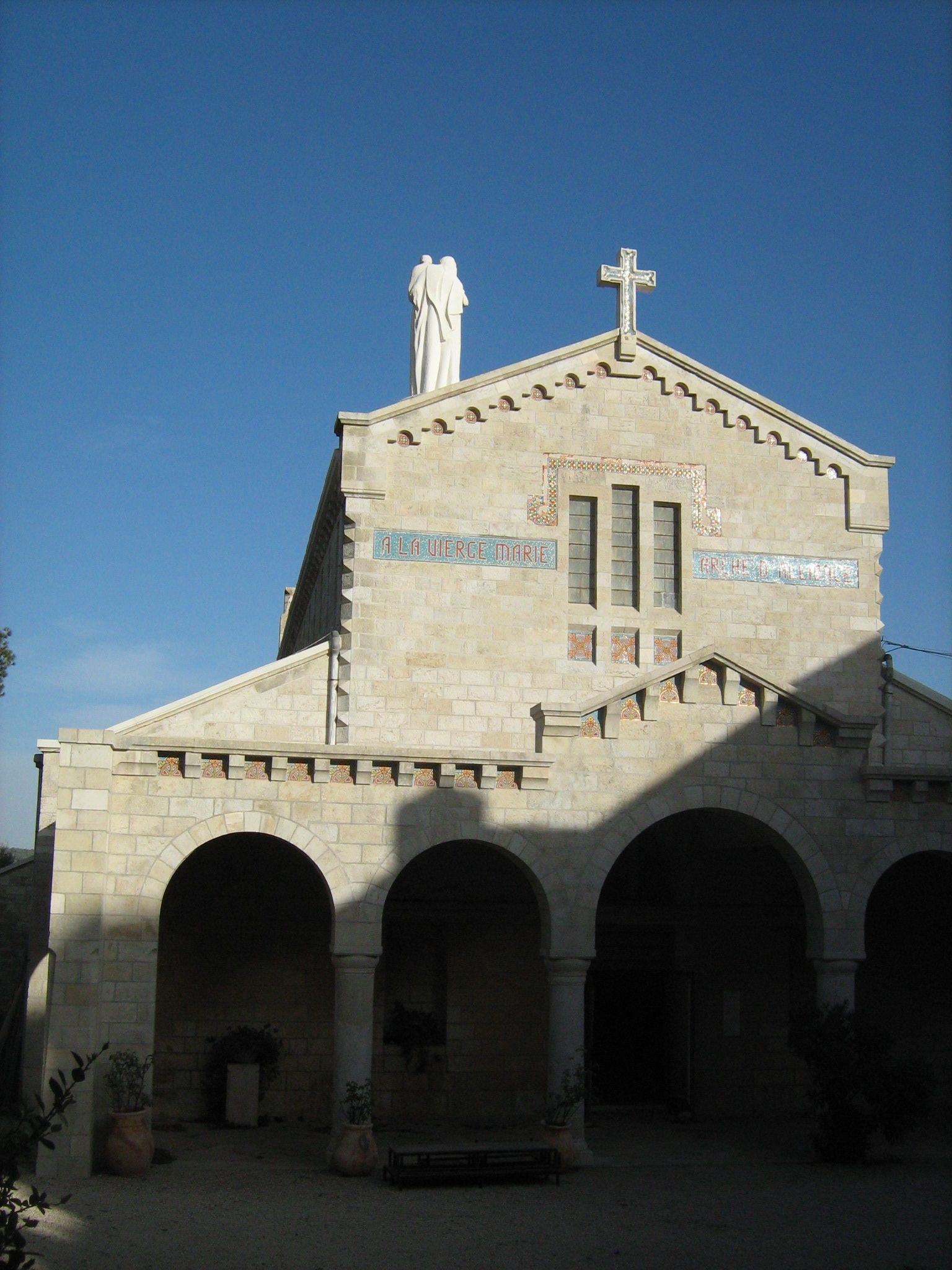 חזית כנסיית גבירתנו של ארון הברית באבו גוש